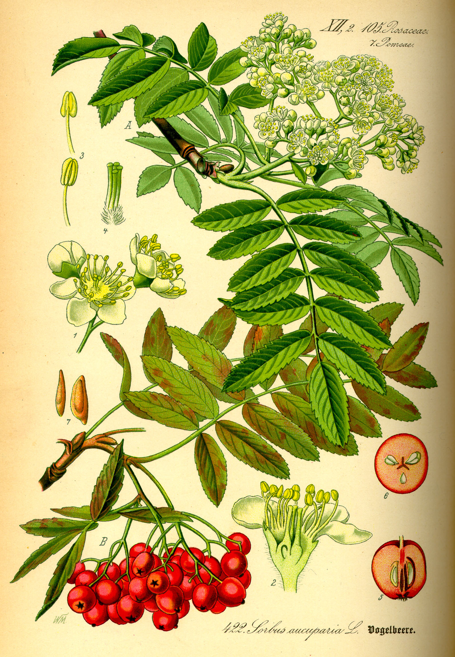 Sorbus aucuparia, Rosaceae, aus Flora von Deutschland, Österreich und der Schweiz von Otto Wilhelm Thomé, Tafeln von Walter Müller